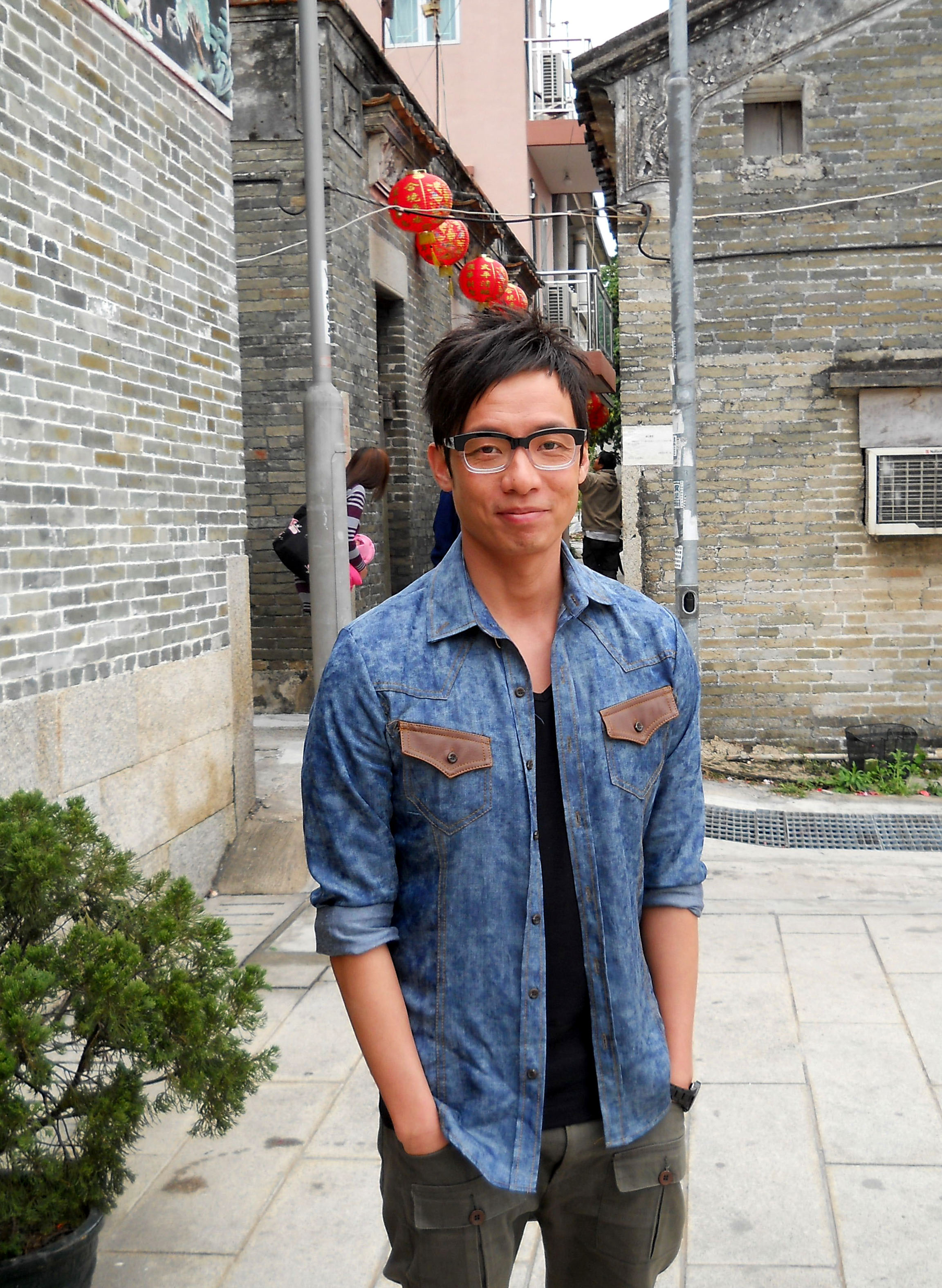 中文（香港）: 許博文